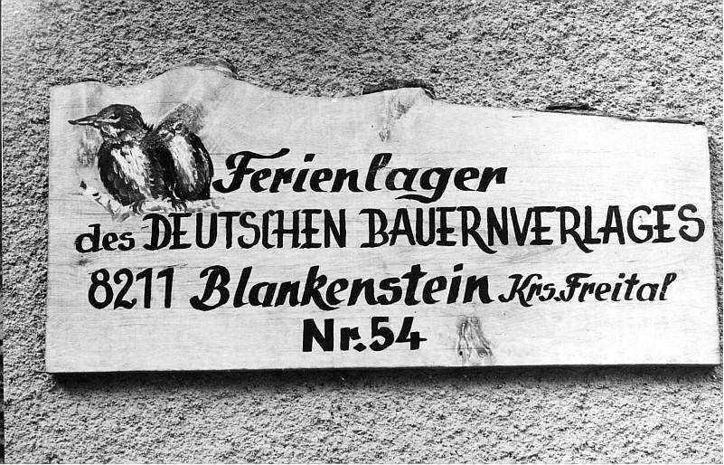 Schild des Ferienlagers an der Obermühle Blankenstein